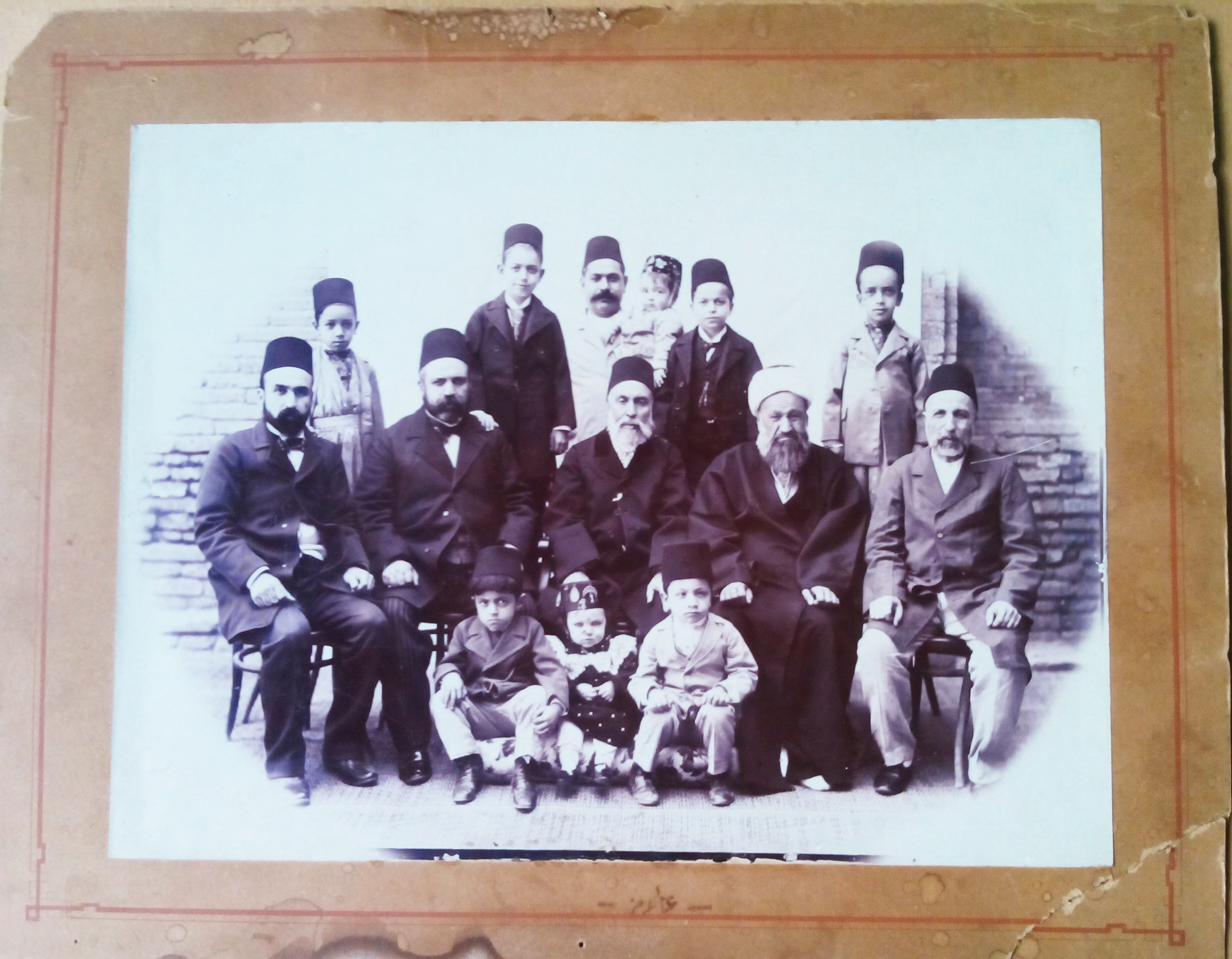 عائلة شاكر أفندي البغدادية في عام 1900 -1901 ، اخذت الصورة في بيت العائلة في منطقة جديد حسن باشا في بغداد، ويظهر في الصورة حفيده محمد أفندي ال شاكر جالسا في الوسط واسماء الجالسون من اليمين (علي افندي) وهو ابو عفيفة بن محمد افندي ثم جار العائلة (محمد اغا) ويجلس في الوسط (محمد) أفندي ثم ولديه ( عبد الرزاق) افندي والد الدكتور (سلمان فائق) الجراح المعروف، واخيرا (حسن) افندي والد كل من (العقيد اسماعيل حقي وصالح زكي)، اما الواقفون فمن اليمين (ابراهيم وصفي) ابو خليل ثم (عبد القادر) ثم الخادم (بكر اغا الكردي) الذي يحمل (صالح زكي) وهنا عمره عام واحد وبعده (عمر شاكر) ابو مؤيد واخيرا (موسى كاظم) الاداري المعروف، والجالسون من اليمين عبد الوهاب و(خديجة) خاتون بنت عبد الرزاق أفندي، وبعدها (اسماعيل حقي) العقيد العسكري . وكانت اسماؤهم مركبة من اسمين كعادة اسماء الافندية، وكلمة افندي كانت تطلق على المثقف